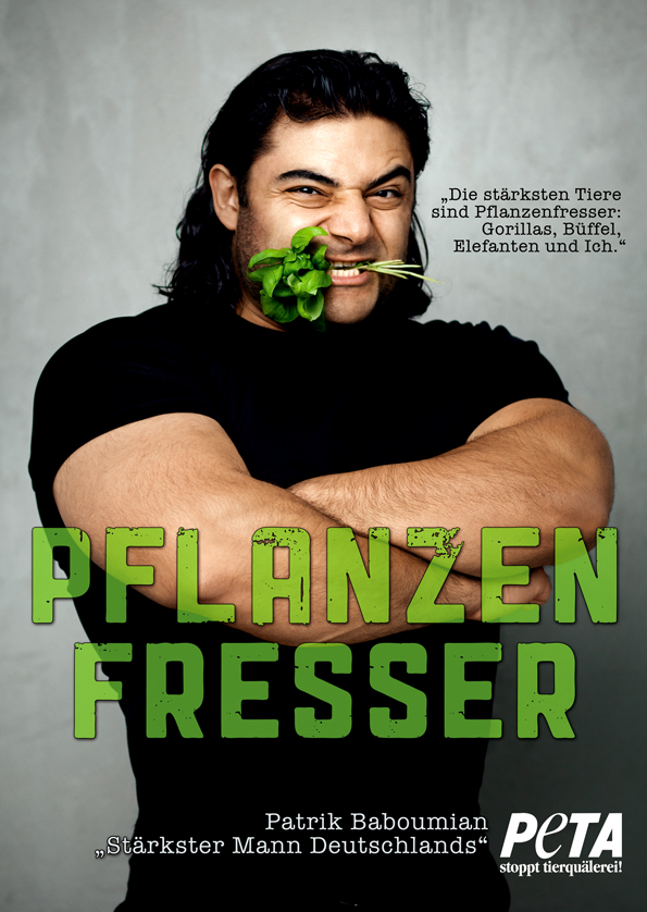 Der „Stärkste Mann Deutschlands“ ernährt sich pflanzlich und ist Star des Veggie-Motivs von PETA Deutschland